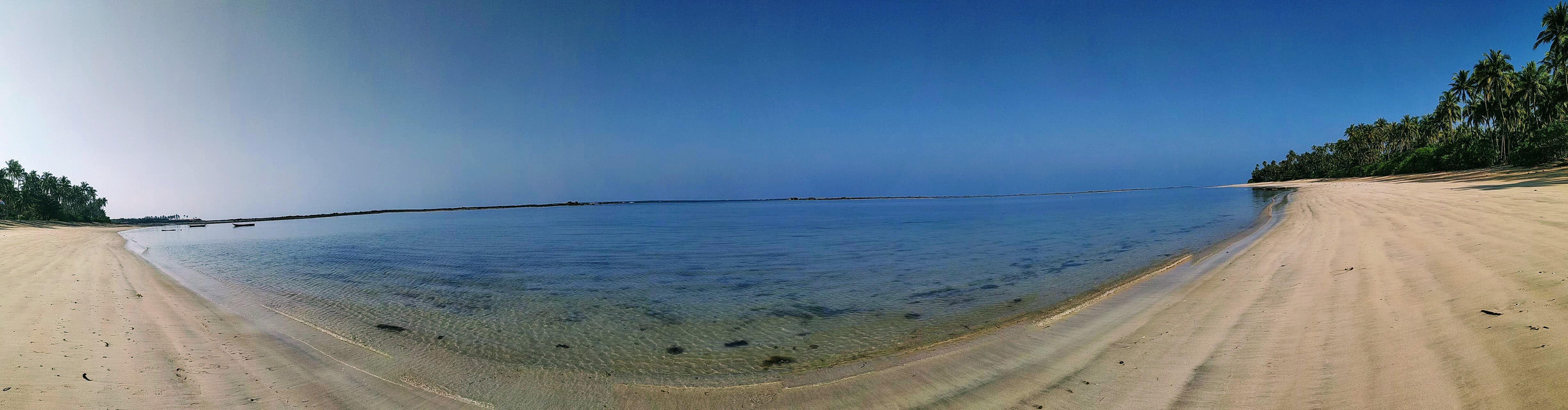 မြန်မာဘာသာ: ရွှေသောင်ယံမြို့၏ ကမ်းခြေသည် အနည်းငယ်ကျဉ်းသော်လည်း ရှည်လျှား၍ သန့်ရှင်းပြီး ရေမှာလည်း အလွန်ကြည်လင်သည်